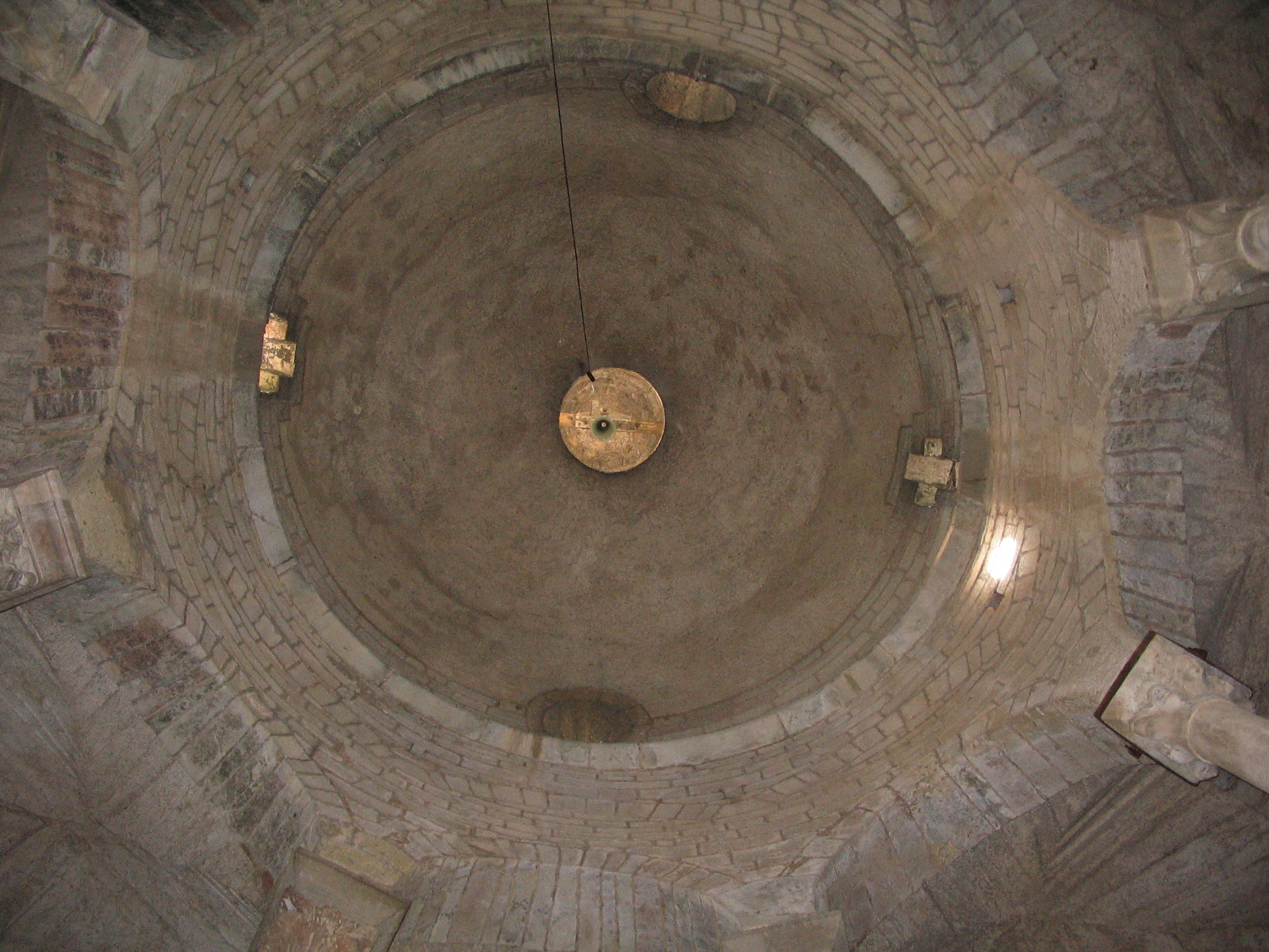 Autore Giorces. San Tomè, la lanterna vista dal piano terra.